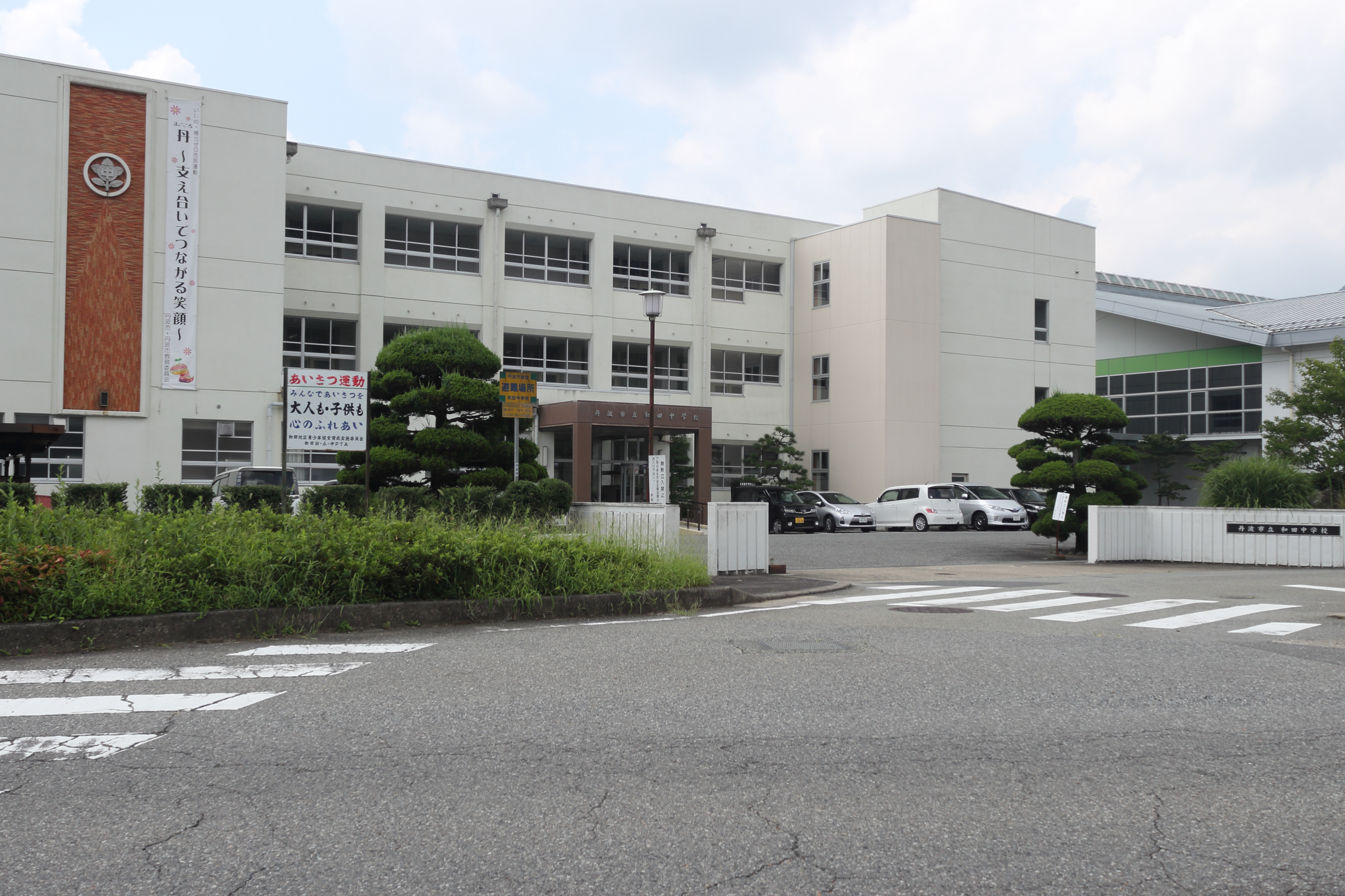 丹波市立和田中学校